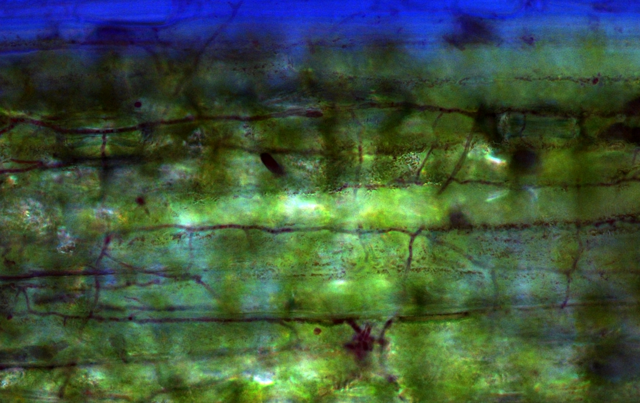 Tõlvtõviku (Eipchloe typhina) hüüfid põldtimuti (Phleum pratense) lehe rakkude vahel värvituna toluidiin sinisega.